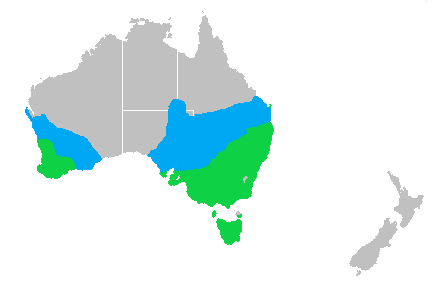 Seasonal distribution of Biziura lobata in Australia